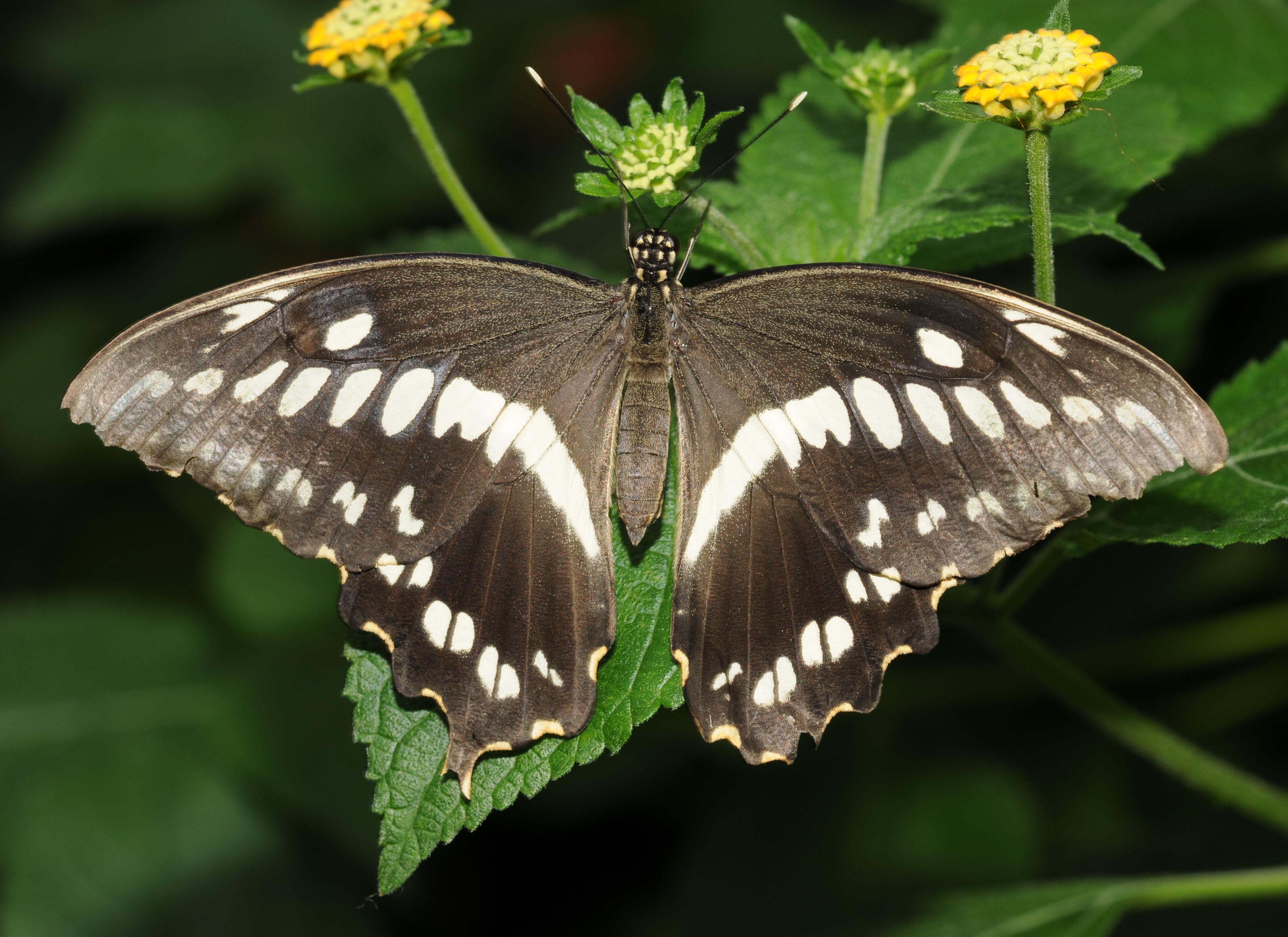 Jardin des papillons, Hunawihr.